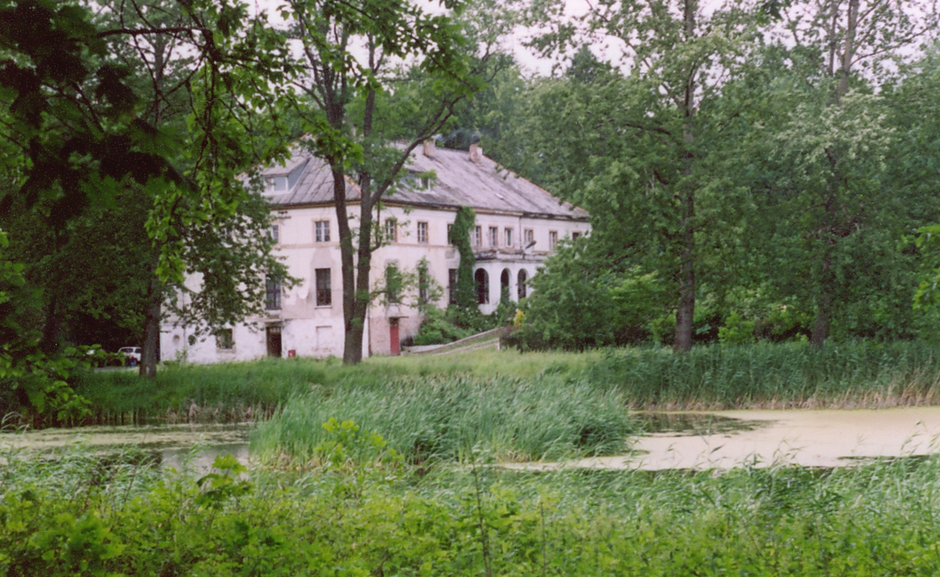 Gąbino, pałacyk z XIX wieku